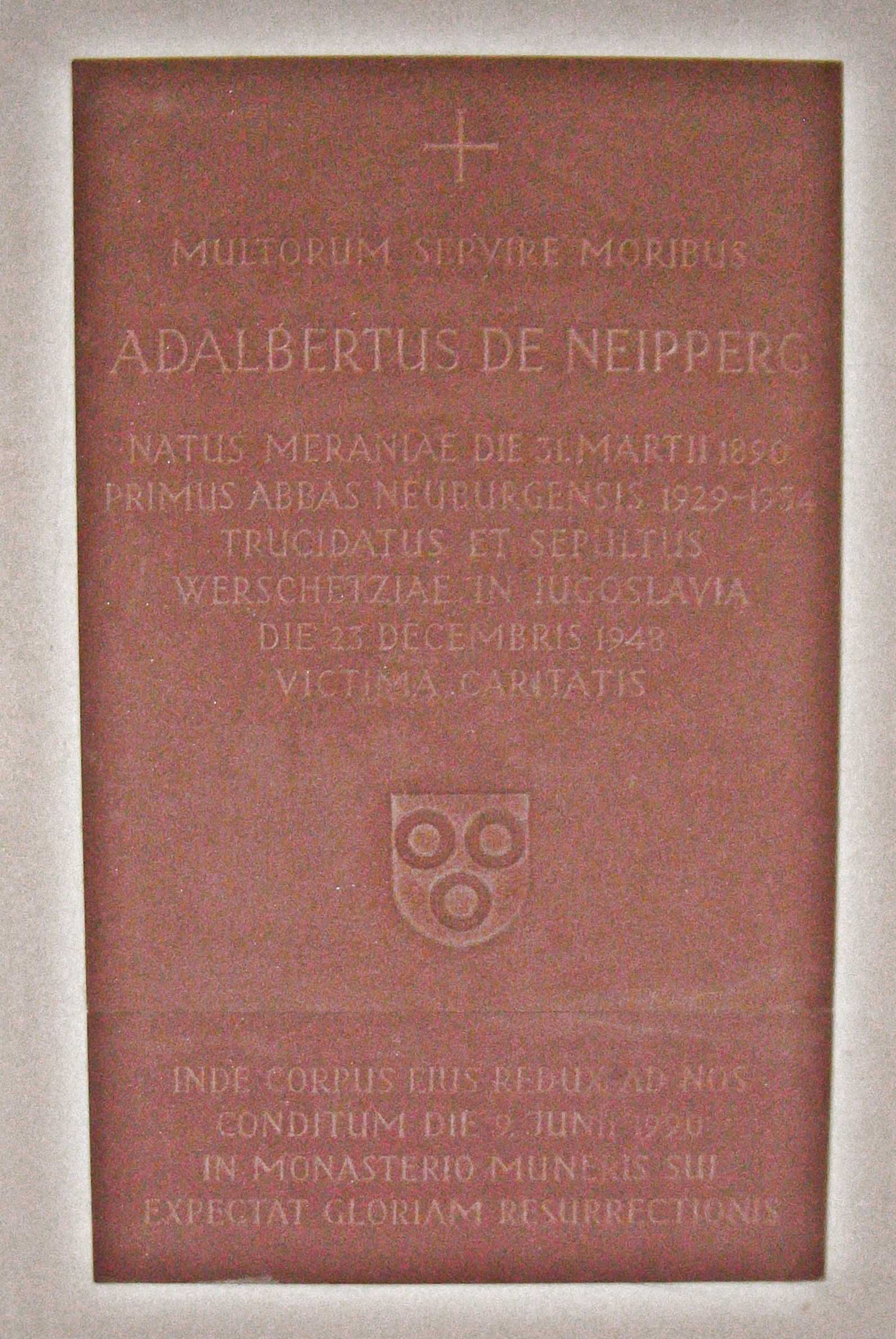 Grabplatte des Abtes Adalbert von Neipperg, Stift Neuburg, Heidelberg